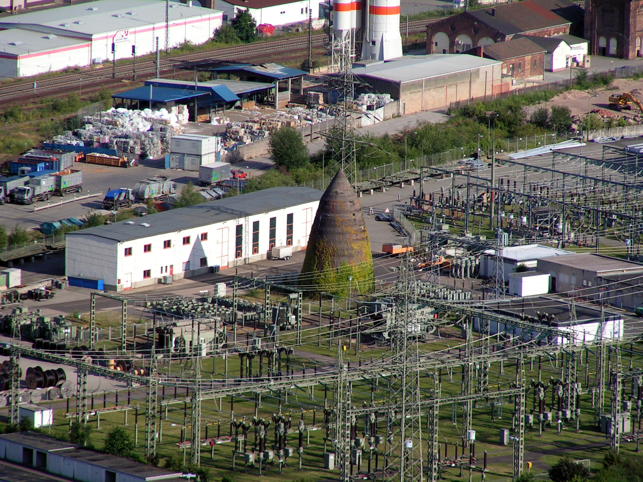 Winkelbunker Trier-West, RWE-Gelände, Umspannanlage Trier (links 220-kV-, rechts 110-kV-Anlagenteil)